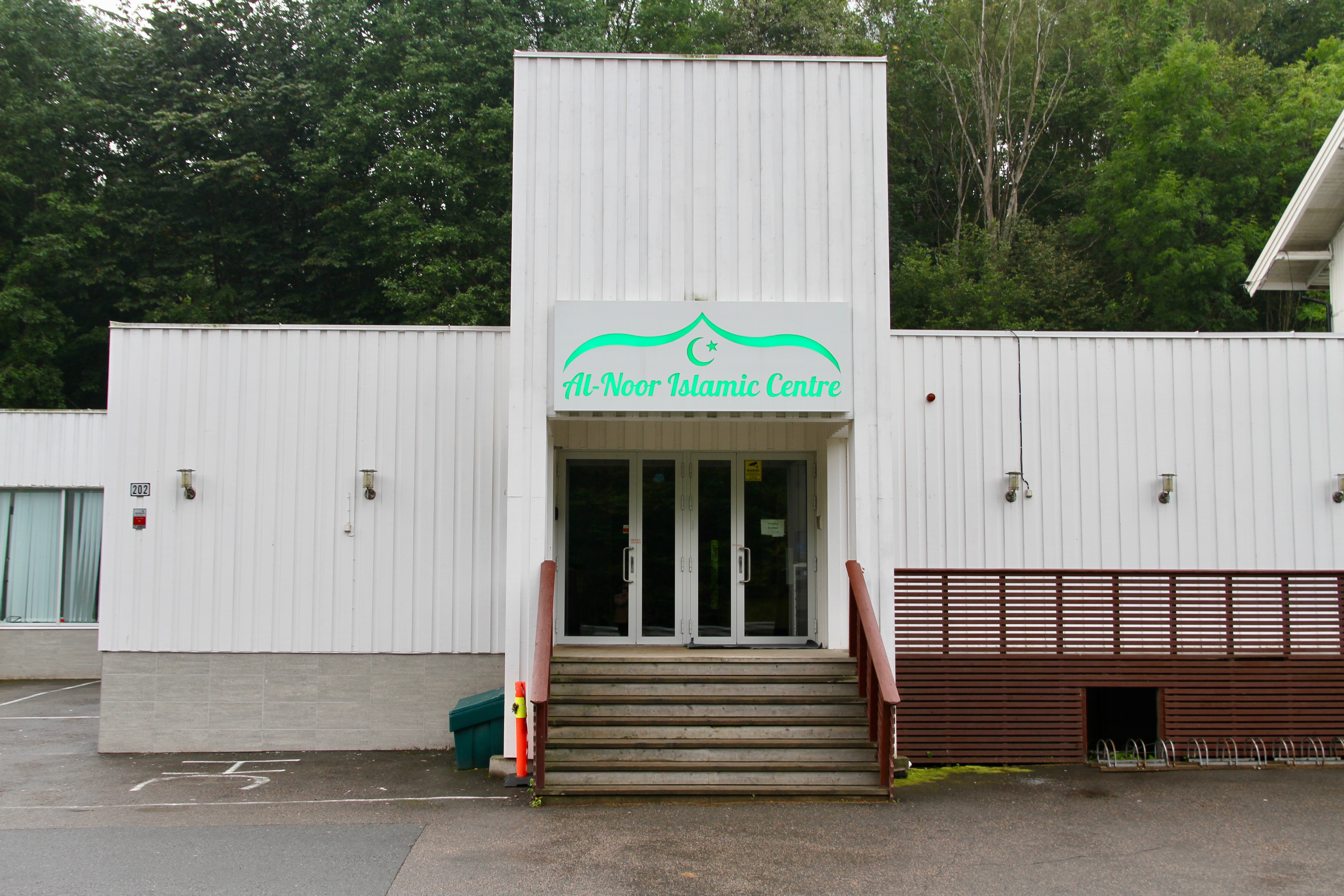 Al-Noor Islamic Centre i Bærum.